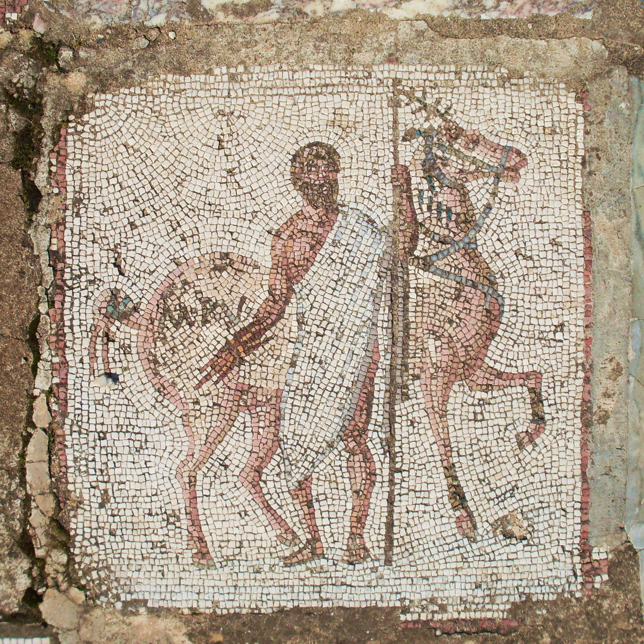 Panneau de la mosaïque des cheveaux